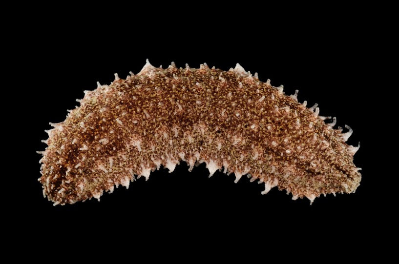 Une holothurie Holothuria albiventer.